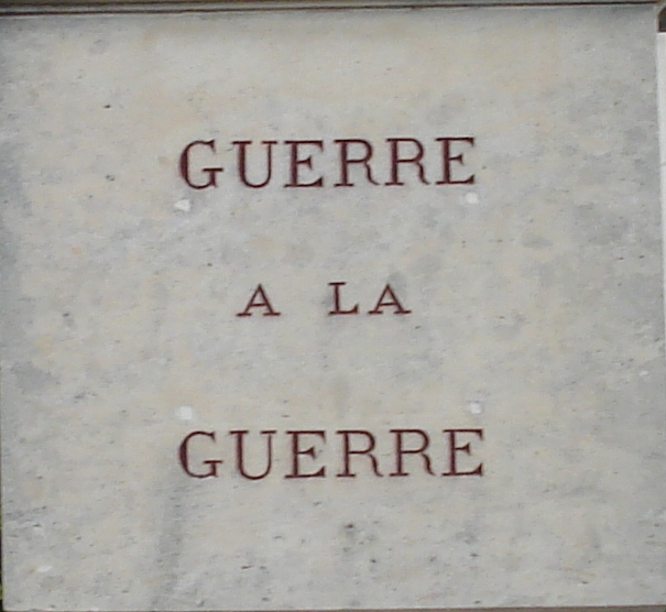 monument aux morts de Gy l'Evêque